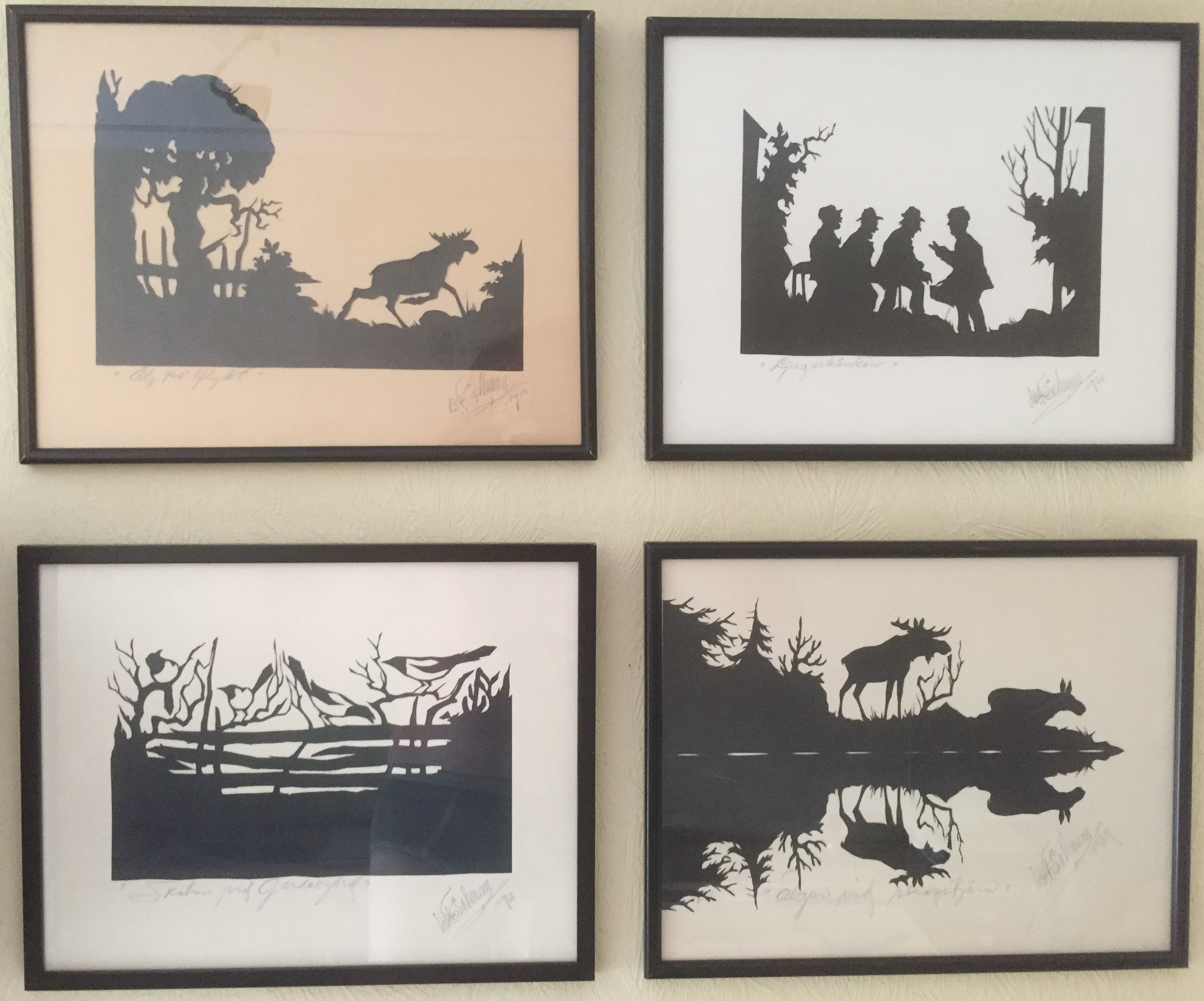 Siluettklipptavlor av Bror F Sehman